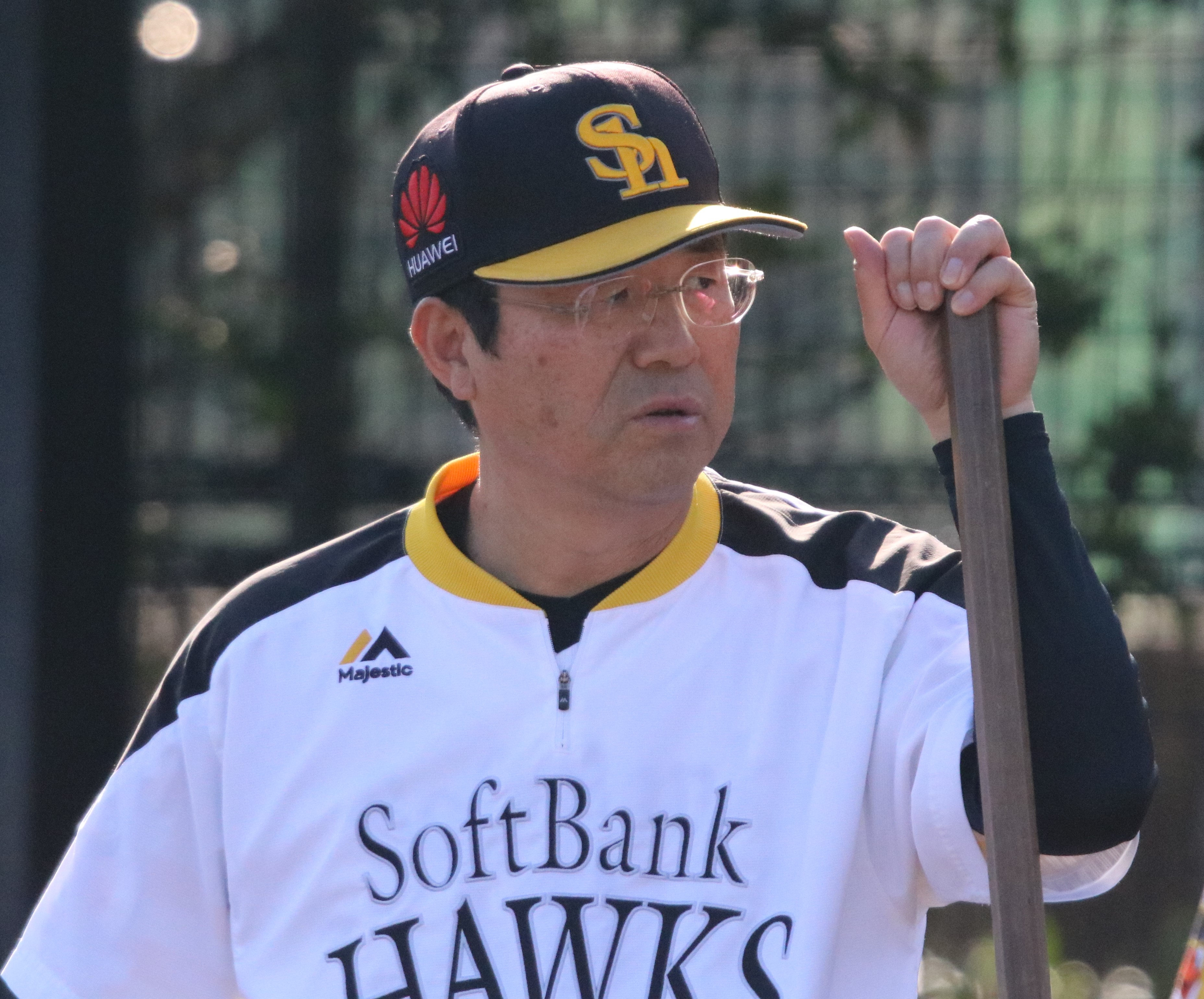 2017/11/11 秋季キャンプ(宮崎市生目の杜運動公園)